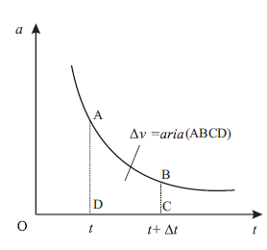 Aria de sub curba acceleraţiei